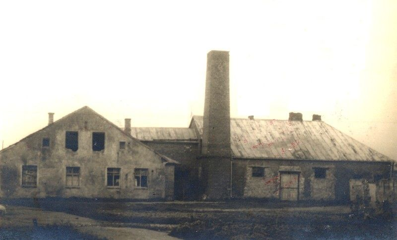 Budynek zbudowany na początku XX wieku, położony na końcu placu Mykwy nad rzeczką Seracz. Pełnił funkcję Mykwy. Wnętrze pokryte porcelaną. Rozebrana po wojnie. Opiekun: Szmul Majer Kersznbojm. Wcześniej na tym miejscu stała stara drewniana Mykwa zbudowana w 1861 roku.